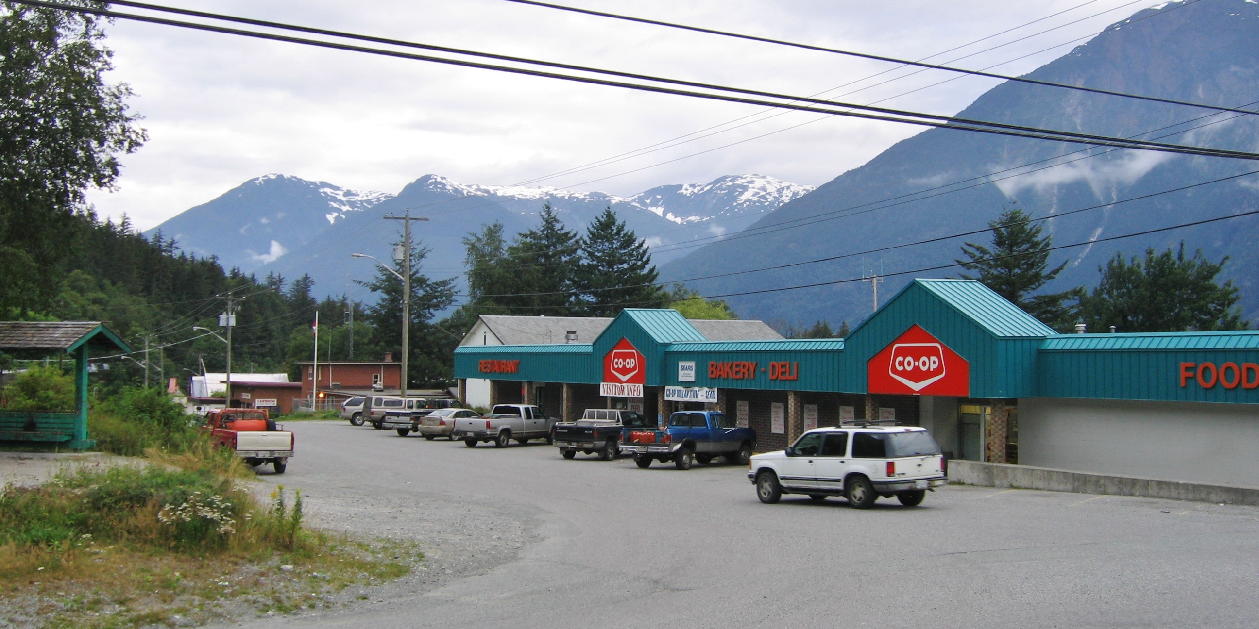 Bella Coola Consumers Co-op